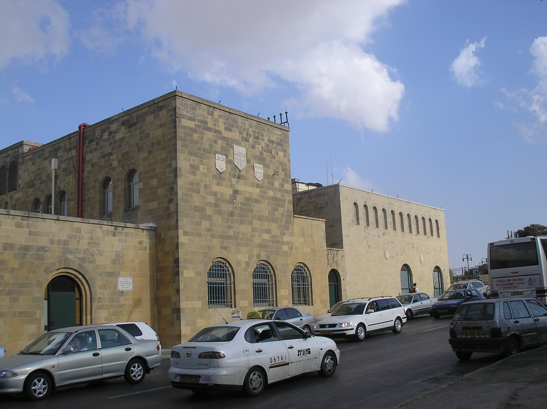 Mount Zion Hotel